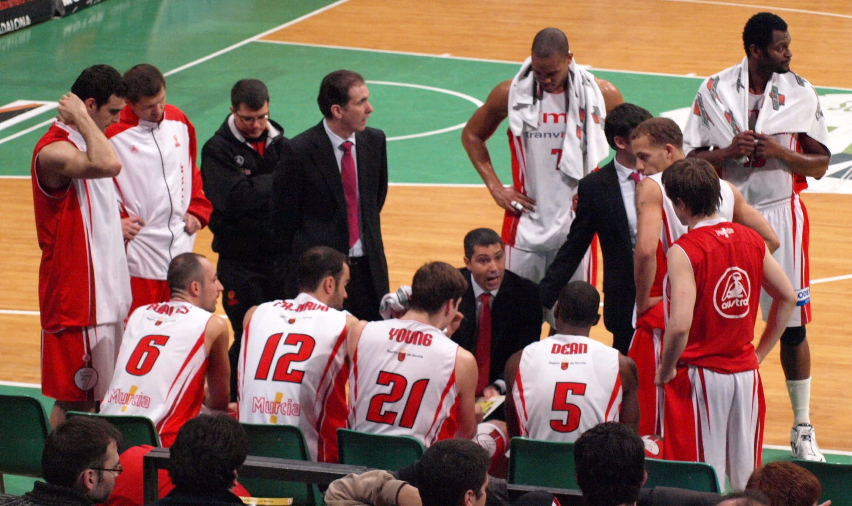 Plantilla y cuerpo técnico del CB Murcia durante un tiempo muerto del partido disputado en el pabellón Olímpico de Badalona ante el DKV Joventut corrrespondiente a la temporada regular de la liga ACB 2008/09